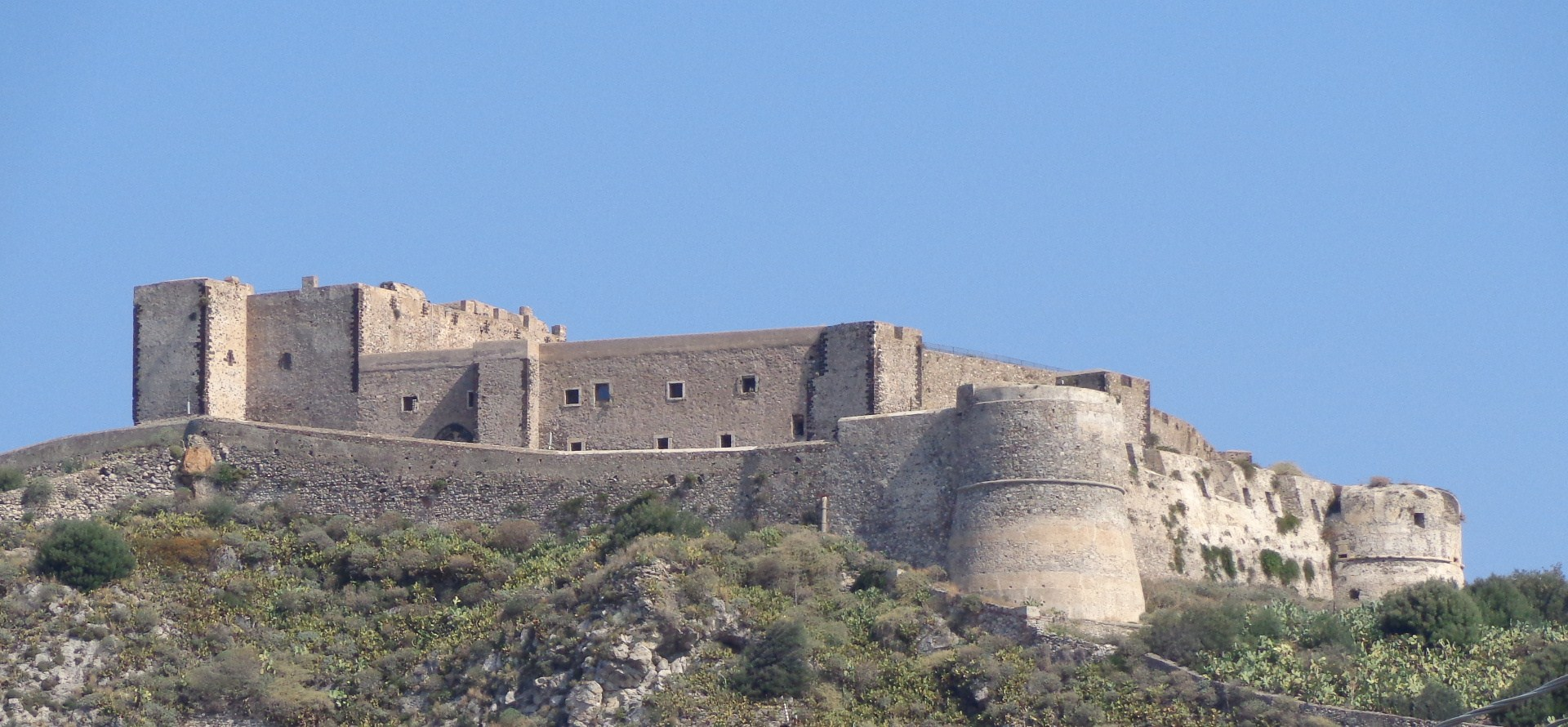 Castello